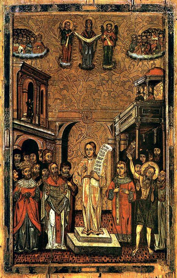 Маларыцкі майстар. Пакроў. 1649. Дошка, яечная тэмпера. 123,5х80х2-5.